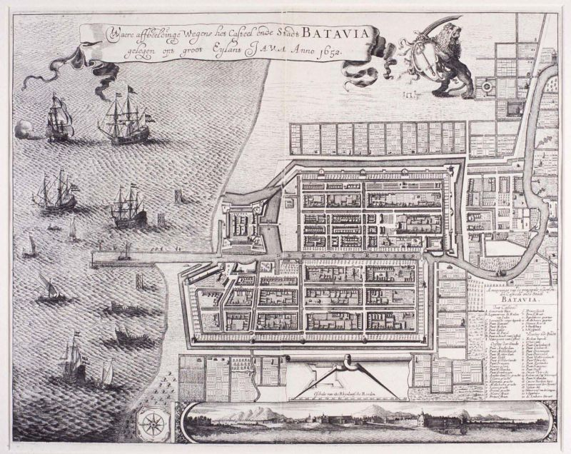 Plattegrond van Batavia. Op de achterzijde een beschrijving van Batavia in het Latijn.